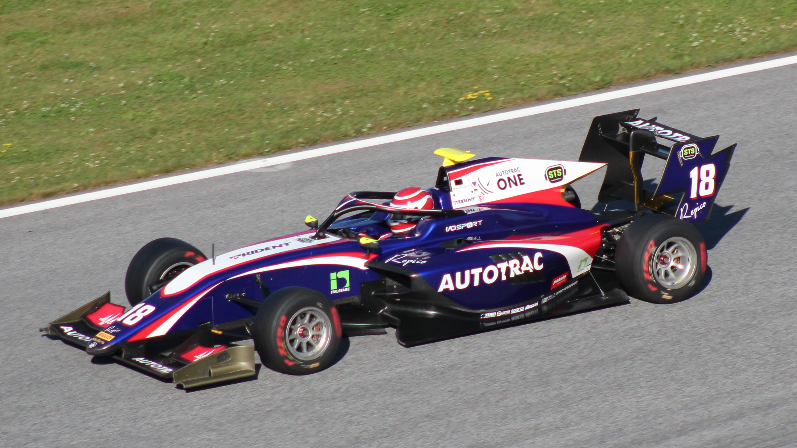 Piquet beim Rennwochenende in Österreich 2019